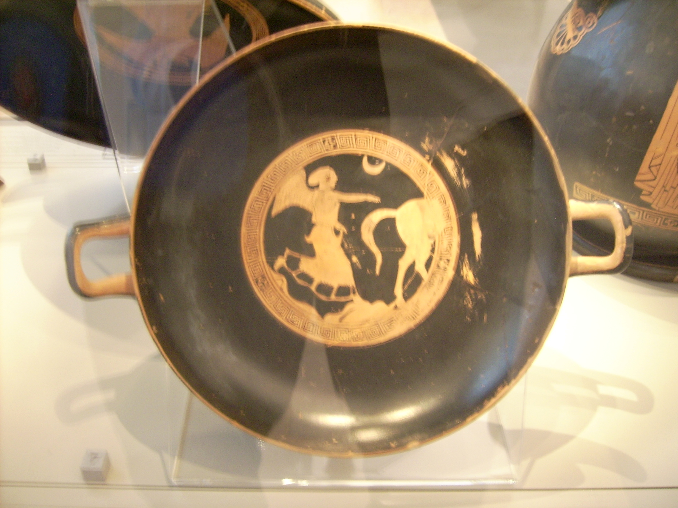 Die Mondgöttin Selene auf einer attisch-rotfigurigen Trinkschale (Kylix), gefunden in Vulci, um 450 v. Chr., Antikensammlung Berlin/Altes Museum